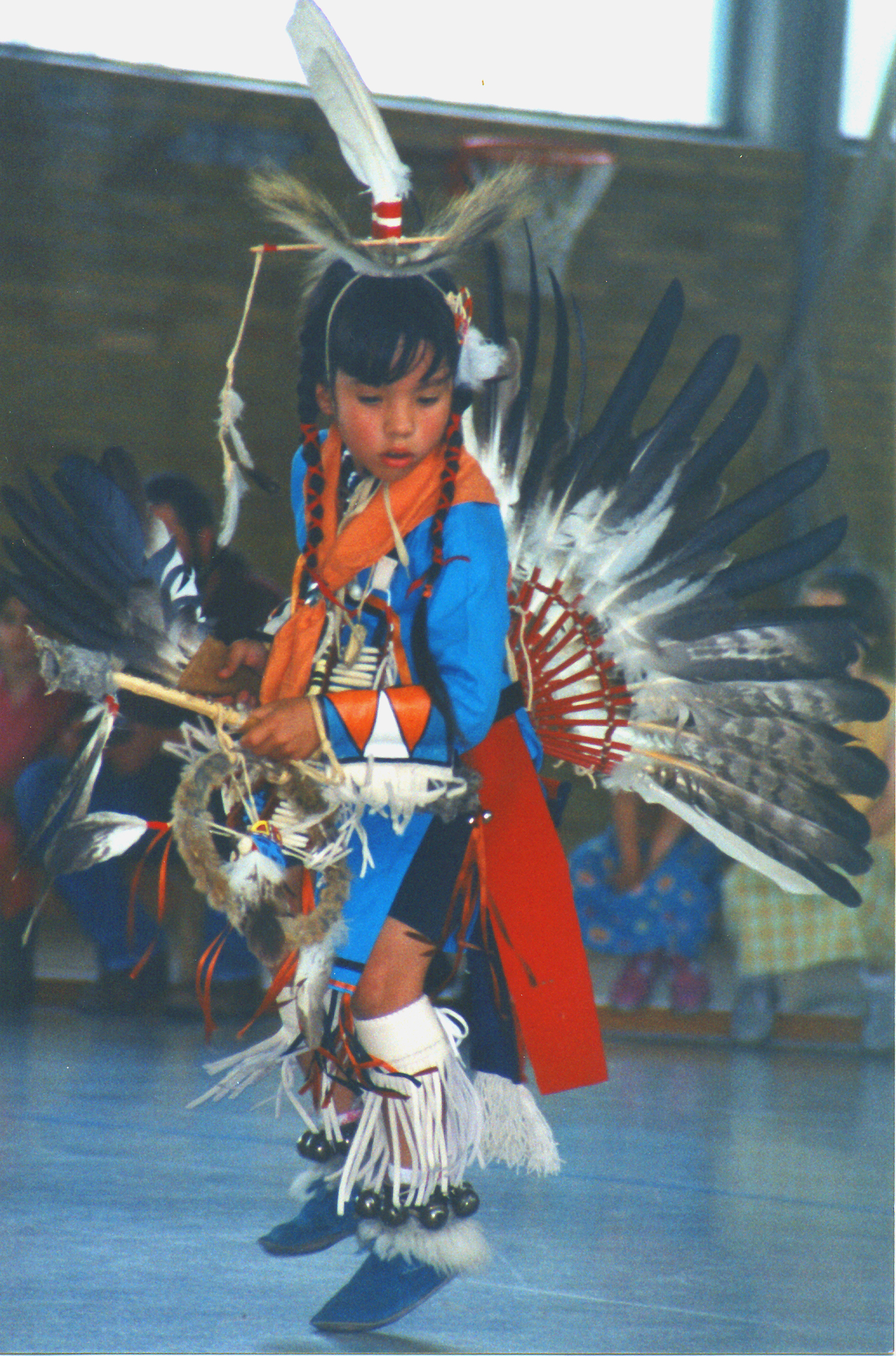 Schnappschuss bei einem öffentlichen Powwow in der Nähe von Frankfurt etwa im Jahr 2000